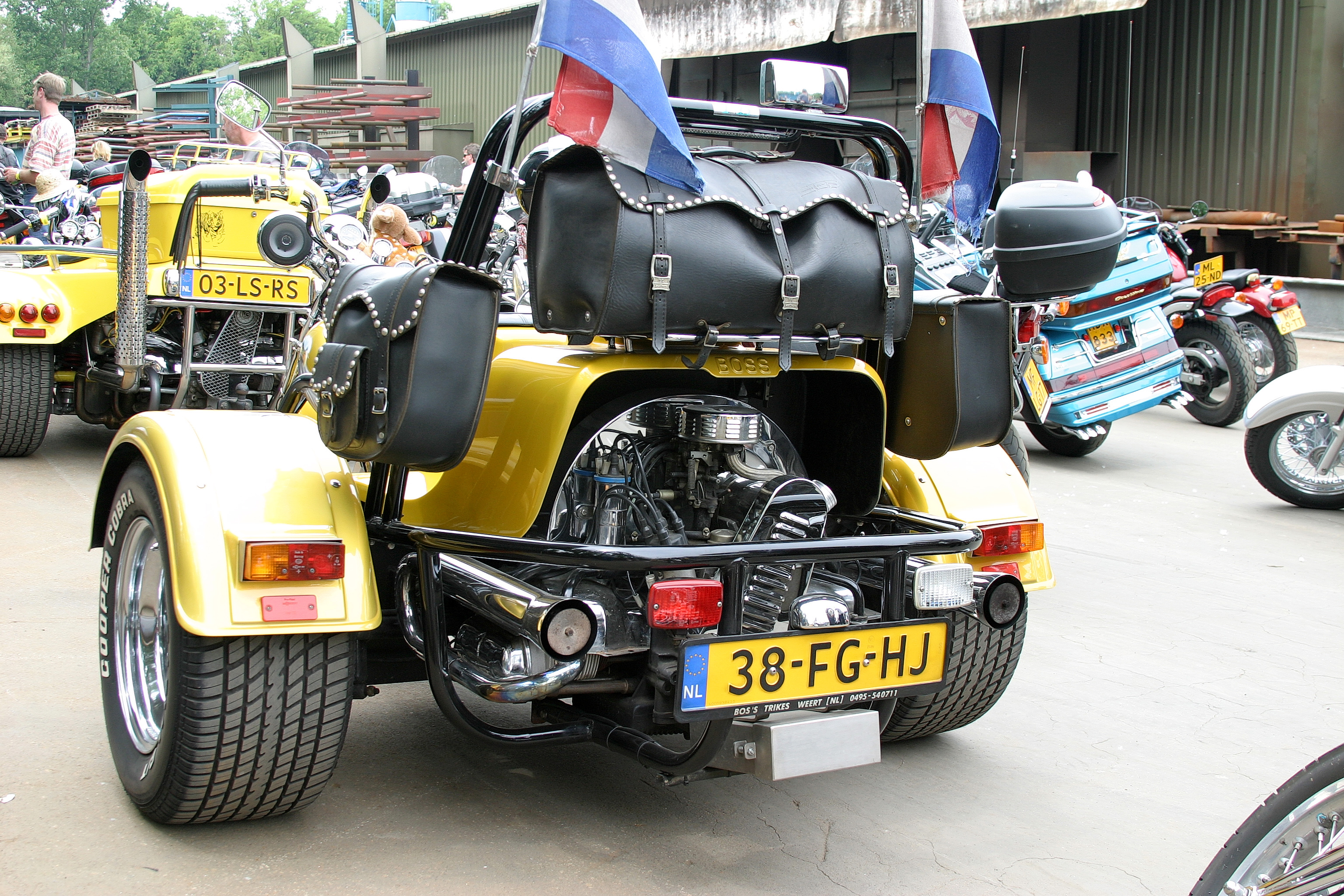 Eigen foto Piero